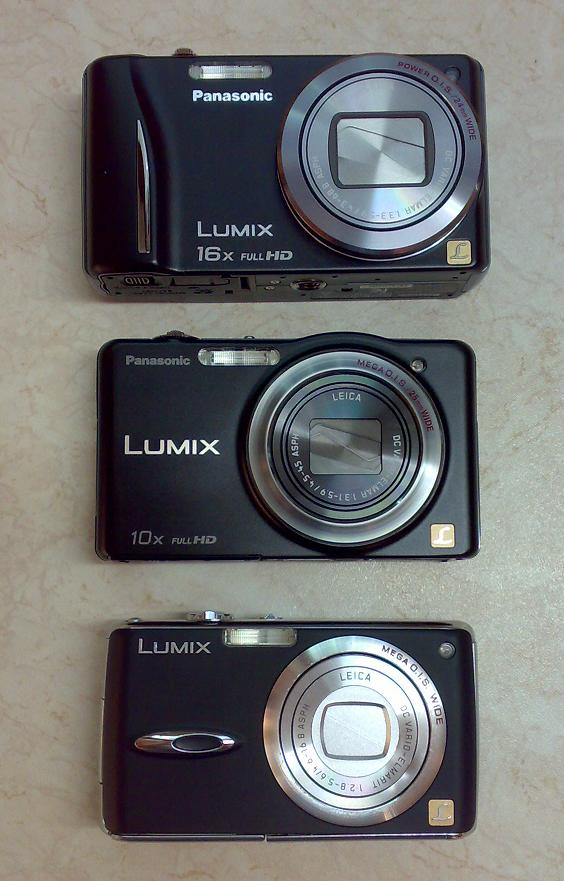 Panasonic Lumix Leica Kamera Modelle TZ22/ZS10, SZ7, FX01